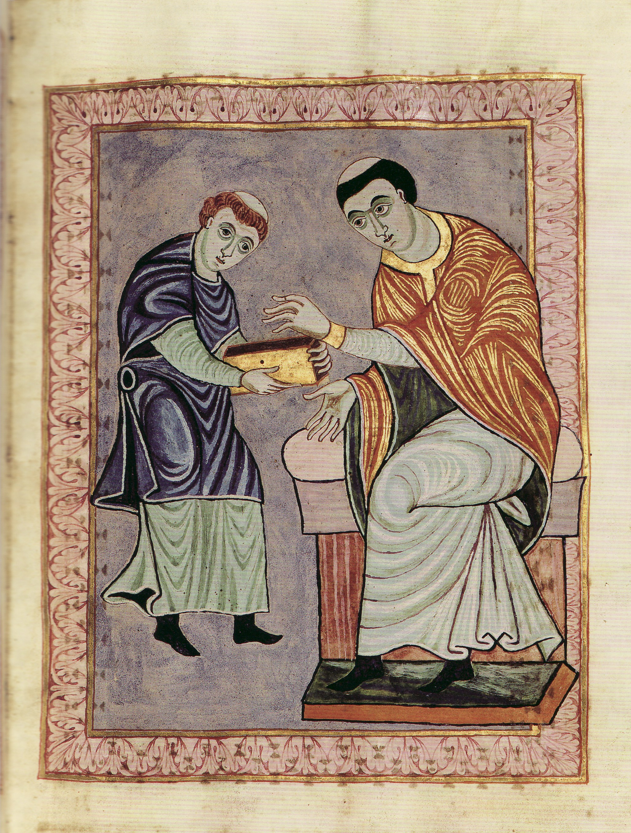 Widmungsbild aus dem Gero-Codex (Universitäts- und Landesbibliothek Darmstadt Hs.1948, fol. 7v.): Ein Mönch übergibt Gero den Codex.